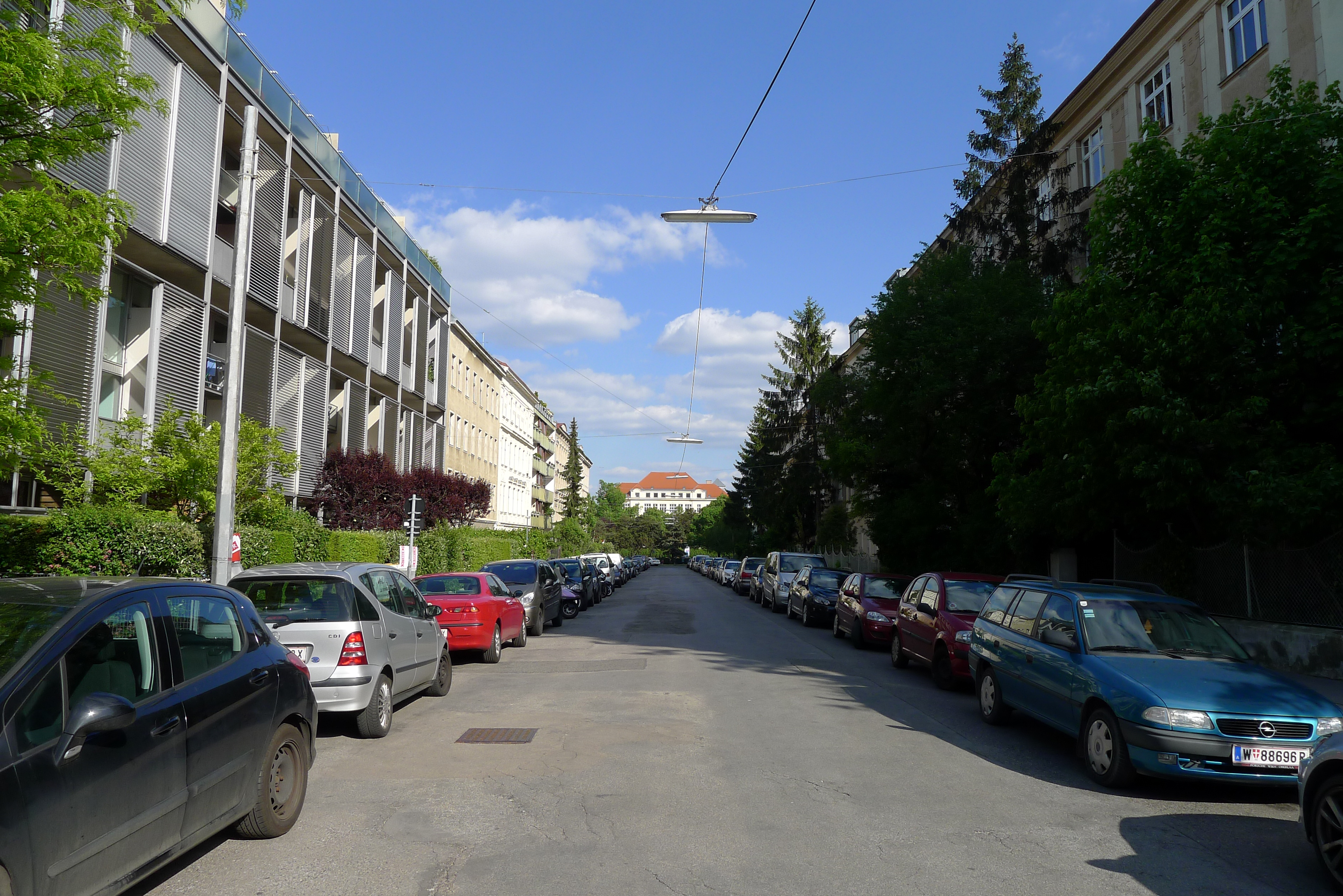 Frauenfelderstrasse in Wien-Hernals, Blickrichtung stadteinwärts.